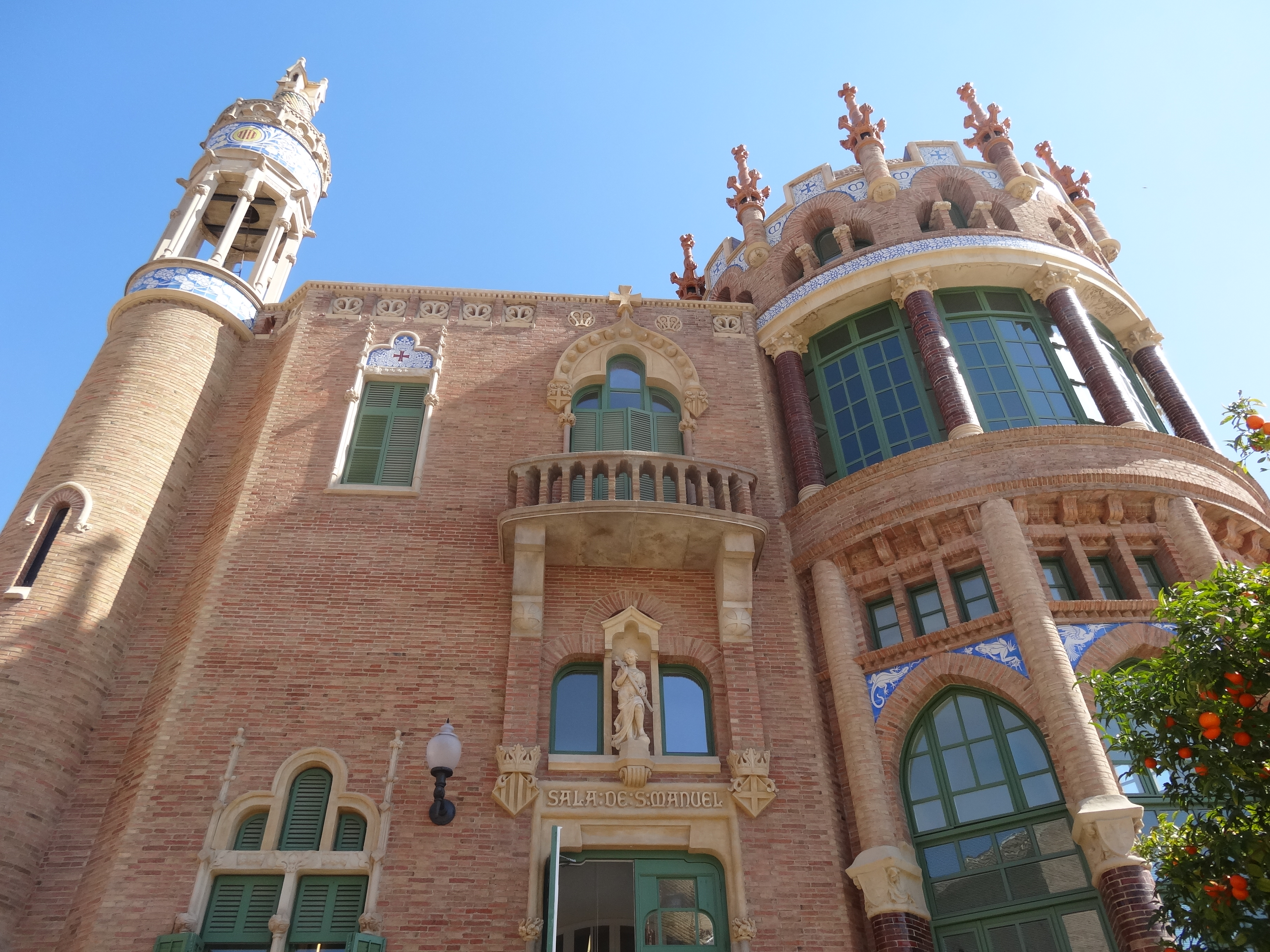 Pavelló de Sant Manuel (Hospital de la Santa Creu i Sant Pau, Barcelona)